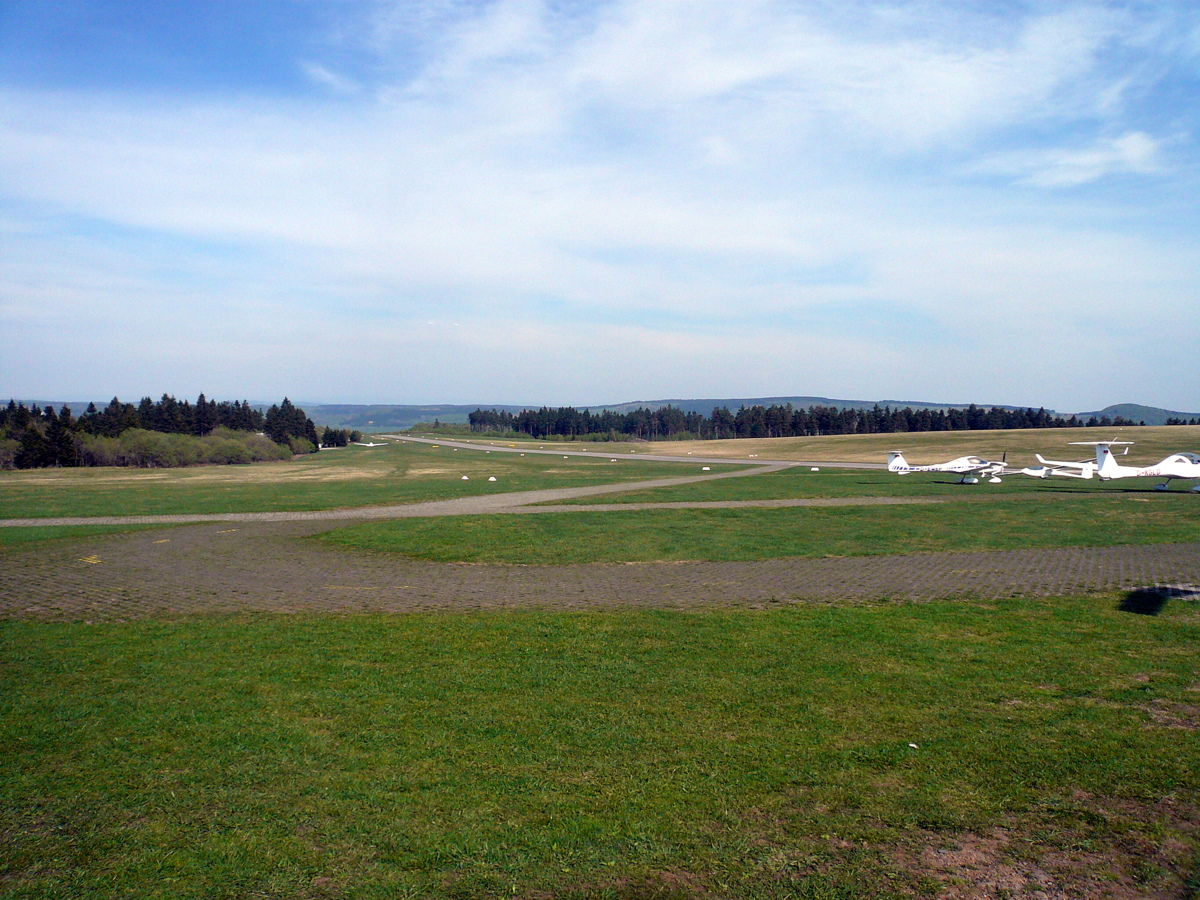 Flugplatz Wasserkuppe